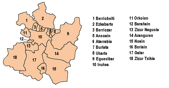 Iruñerriko gune metropolitarra.